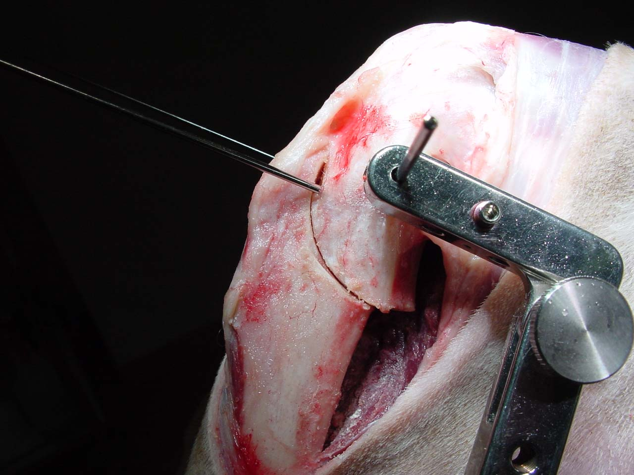 tplo open knee